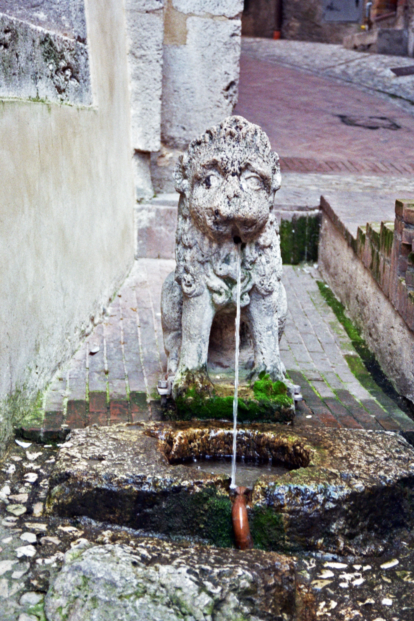 Fontana di Via Porta Fuga Situata nei pressi di Porta Fuga, secondo la leggenda, riportata nelle storie di Tito Livio, i miei concittadini lanciarono olio bollente sui “mauri immani e i numidi cavalli” dell'invasore Annibale; in effetti il grande generale cartaginese non conquistò mai una città romana fortificata e Spoleto lo era alla grande, la porta, che da questa visuale non si vede e che dà il nome a questa caratteristica via fu addobbata coreograficamente in occasione della visita a Spoleto dell'ex regina di Svezia, Cristina, personaggio pittoresco, delle decorazioni permangono alcuni resti in verità incongrui con la severa struttura medioevale del luogo. La fontana una volta era nei pressi della Stazione di Spoleto .